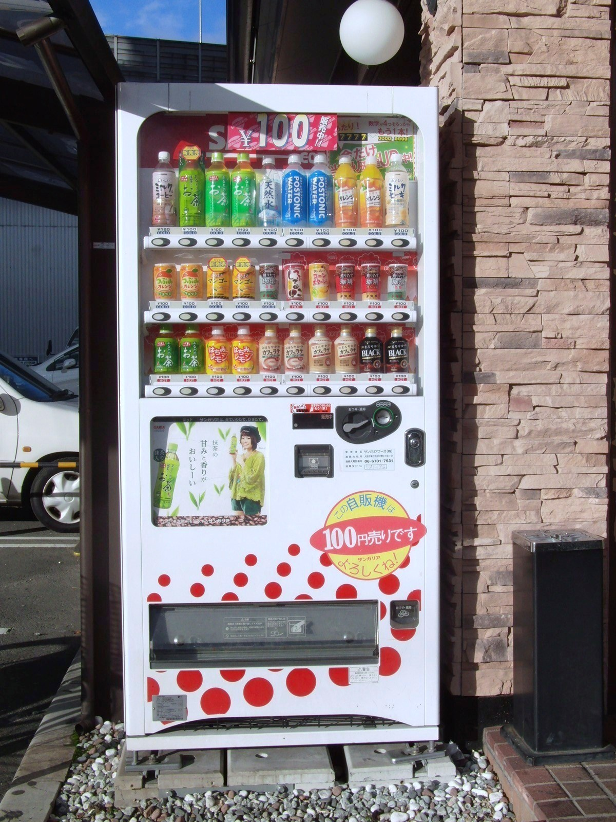 サンガリアの自販機を撮影